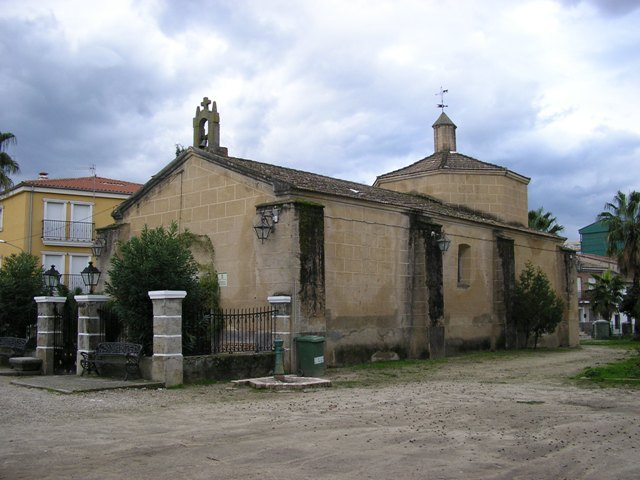 Ermita del Cristo. Zarza de Granadilla. por Jesús Mario García Marín